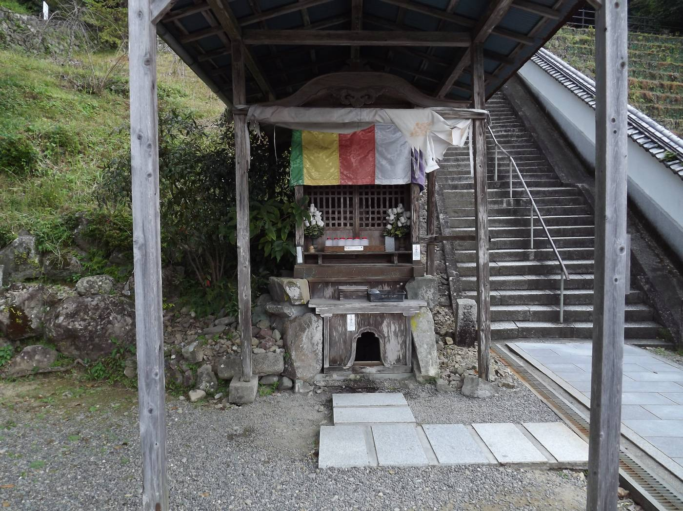 平等寺の白水の井戸